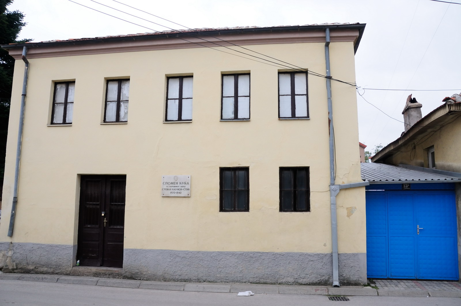 Memorijalem muzej Stiv Naumov-Bitola